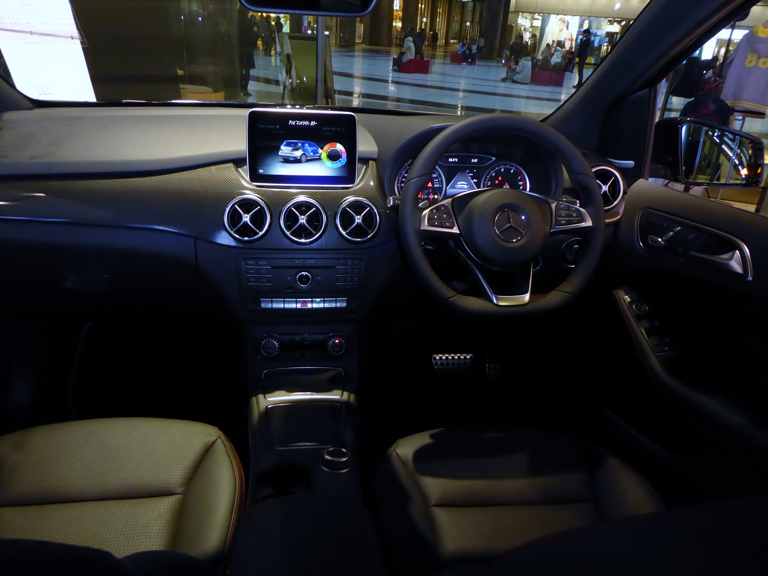 W246型メルセデス・ベンツB250 4マティックスポーツのインテリアを撮影。